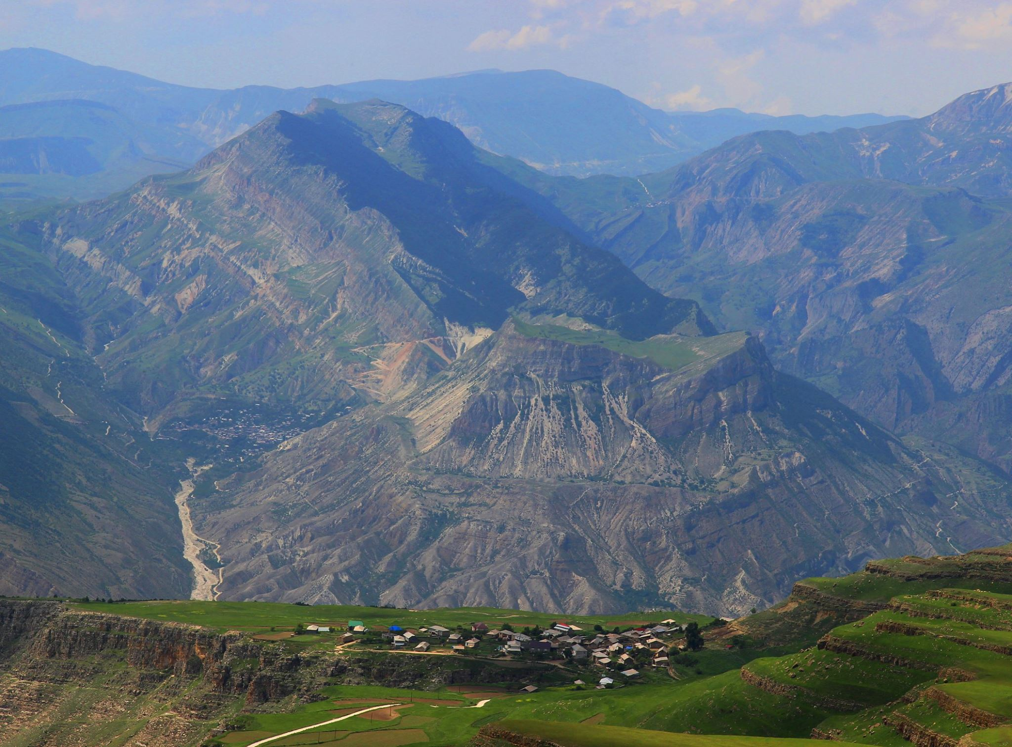 село Нижний Арадерих в Дагестане